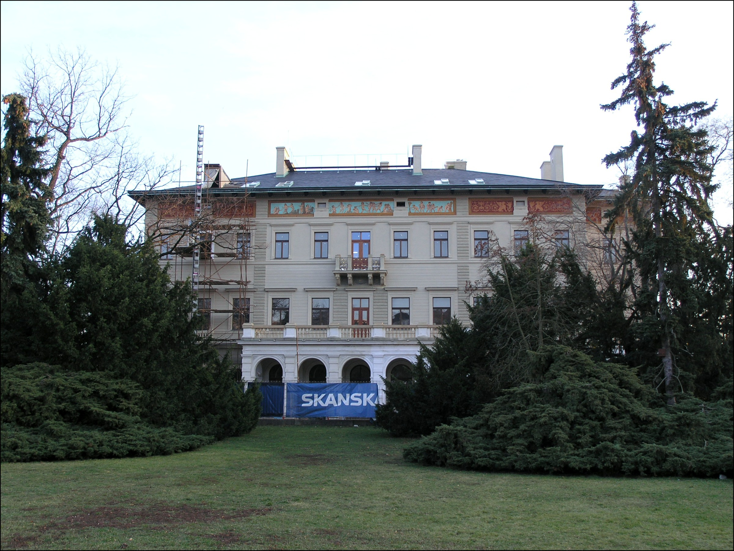 Česky: Rekonstrukce Gröbeho vily v Havlíčkových sadech (Praha, Vinohrady)